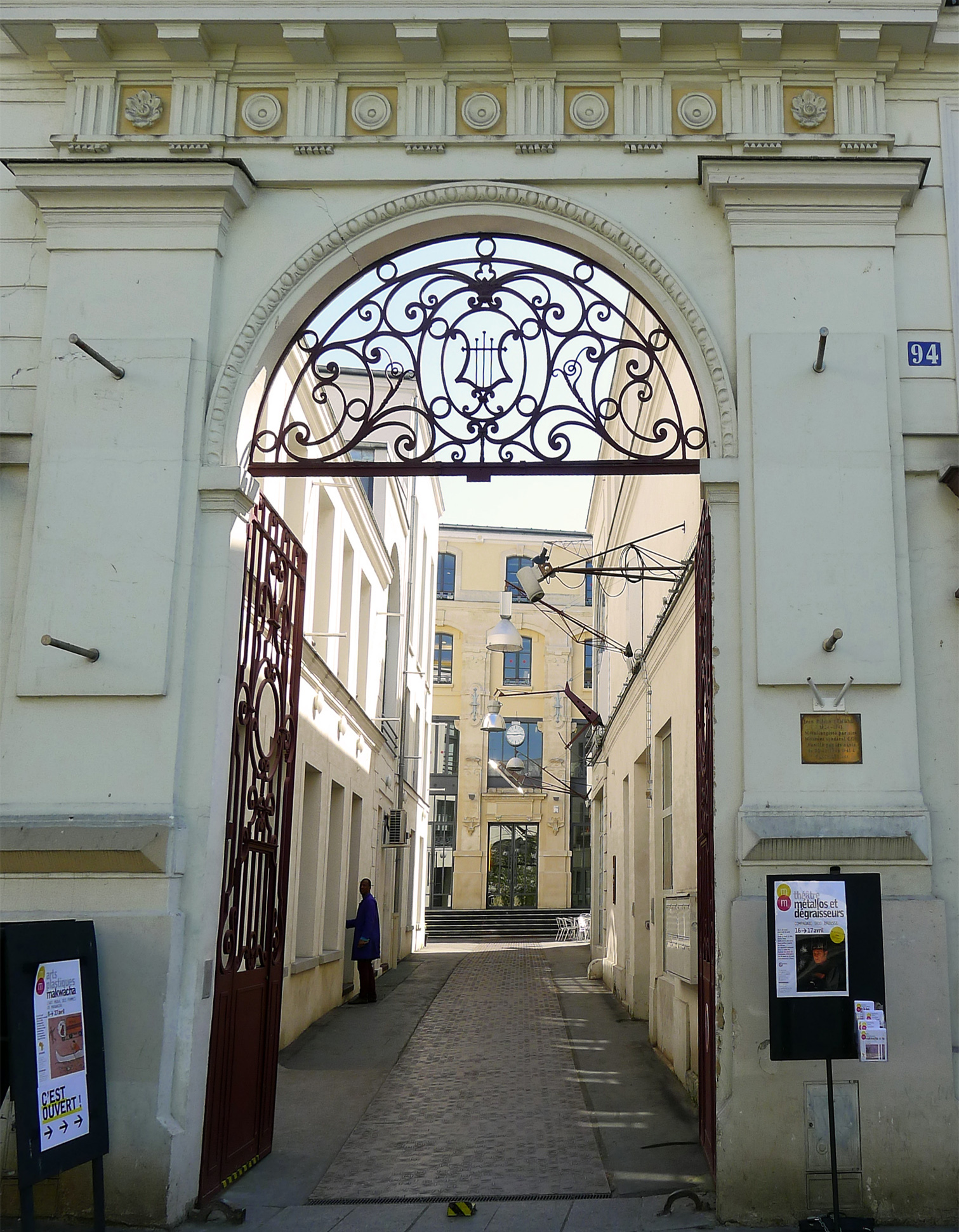 Rue Jean-Pierre-Timbaud (n°94 maison des métallurgistes, entrée) - Paris XI